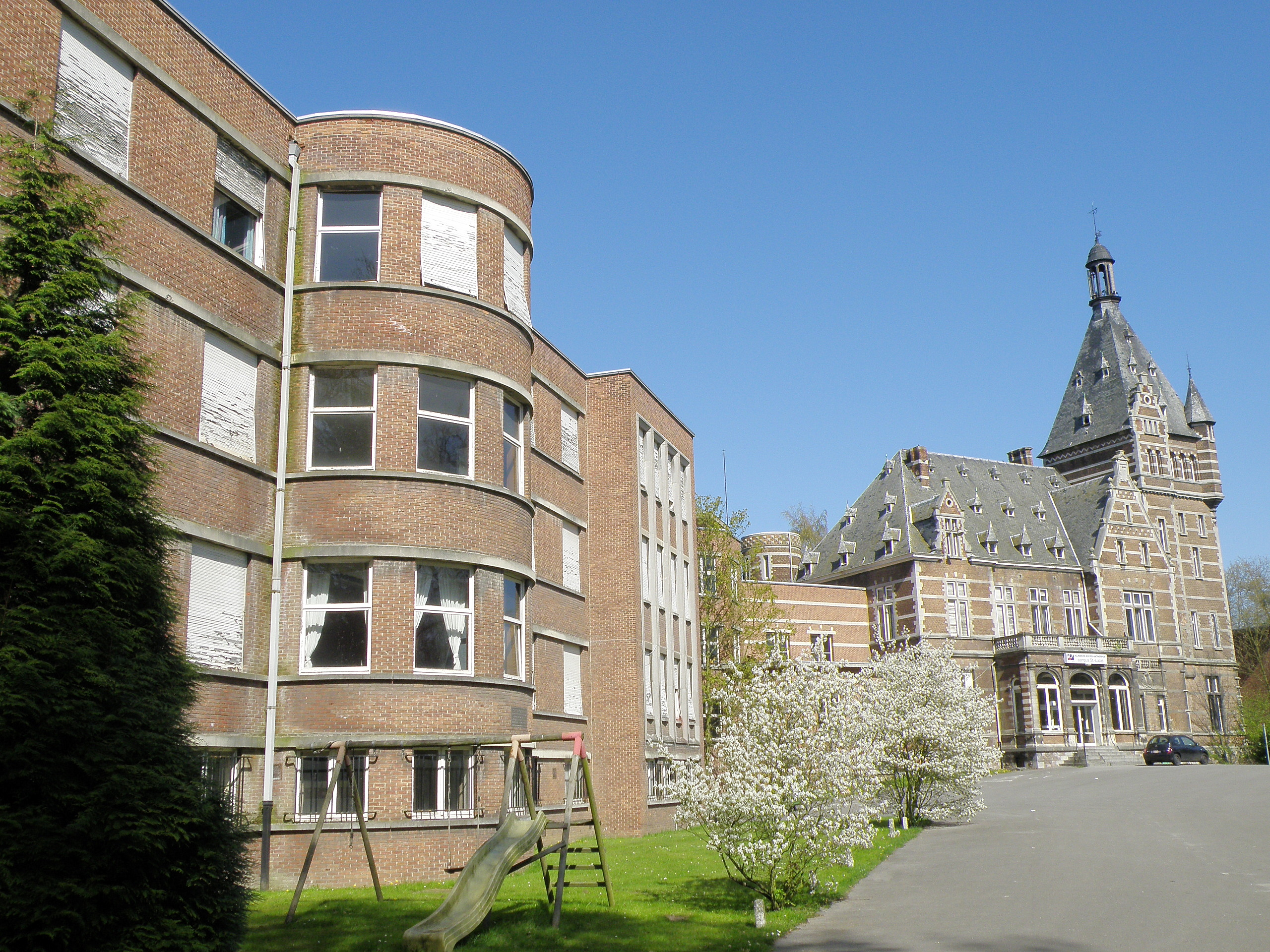 Antwerpen, district Ekeren. Voormalige Sint-Lucaskliniek, voorheen Hof van Delft, bouwjaar 1903, n.o.v. Henri en Leonard Blomme, in neo-Vlaamse renaissancestijl (rechts op de foto; gebouwen links dagtekenen van 1946). Wordt waarschijnlijk gesloopt zomer 2010, wegens te hoge renovatiekosten. Vgl. verder Inventaris Bouwkundig Erfgoed Vlaanderen.